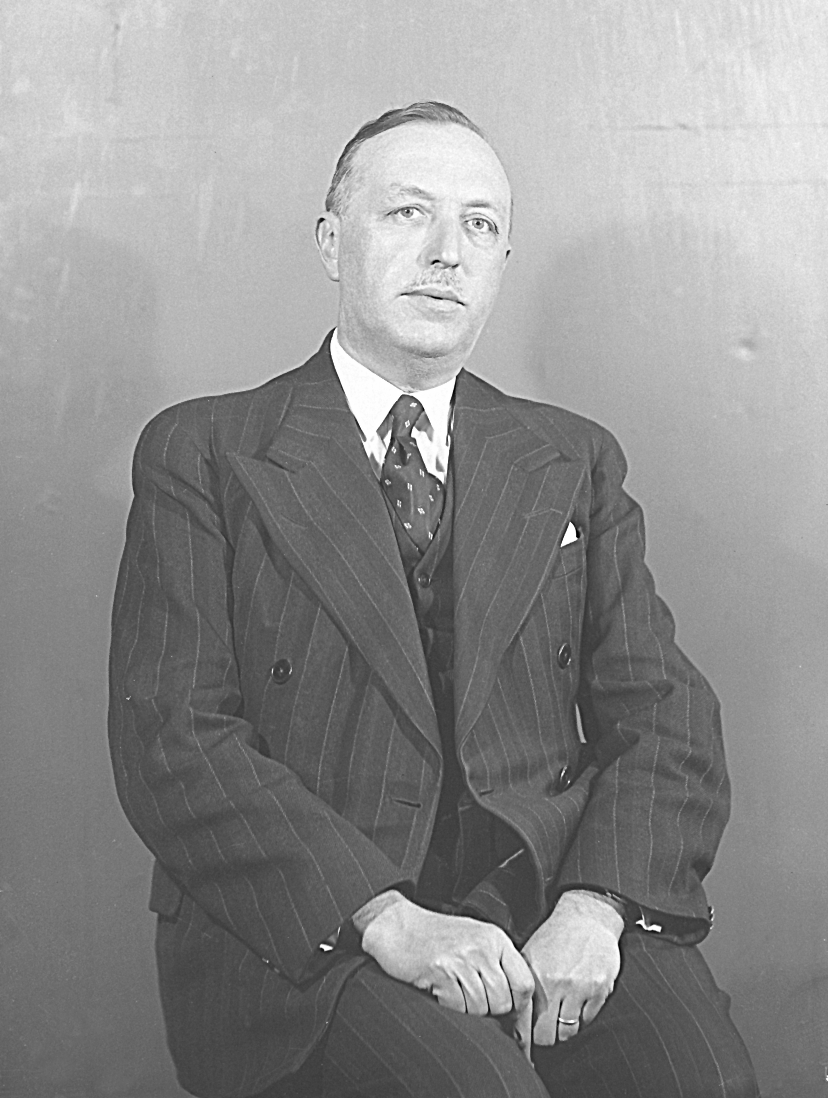 Émile Hennequin, (1887 - ?), Directeur de la Police Municipale à la Préfecture de Police, signataire de la circulaire 173-42 du 13 juillet 1942, organisant la Rafle du Vel d'Hiv.